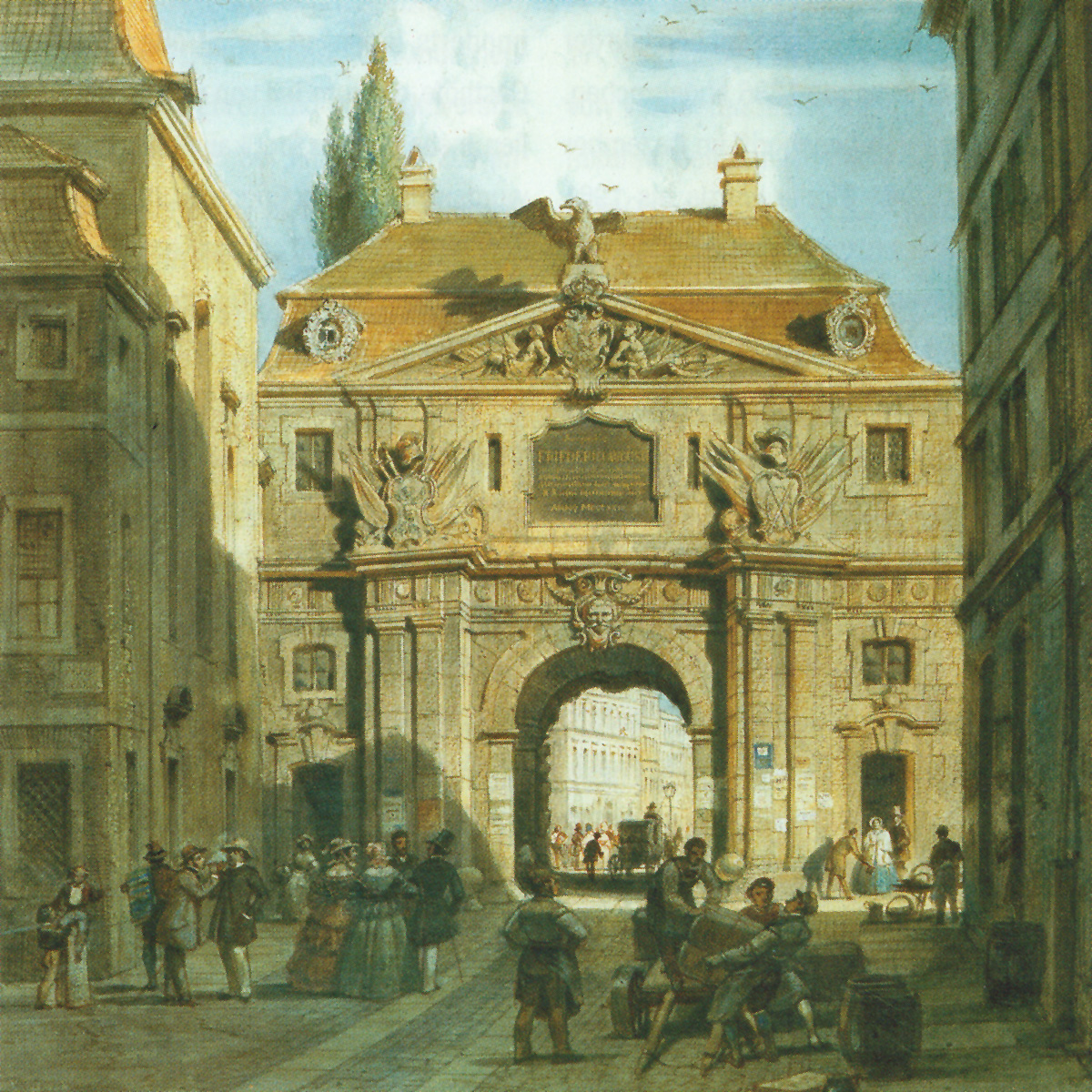 Das Peterstor in Leipzig auf einem Aquarell von 1859